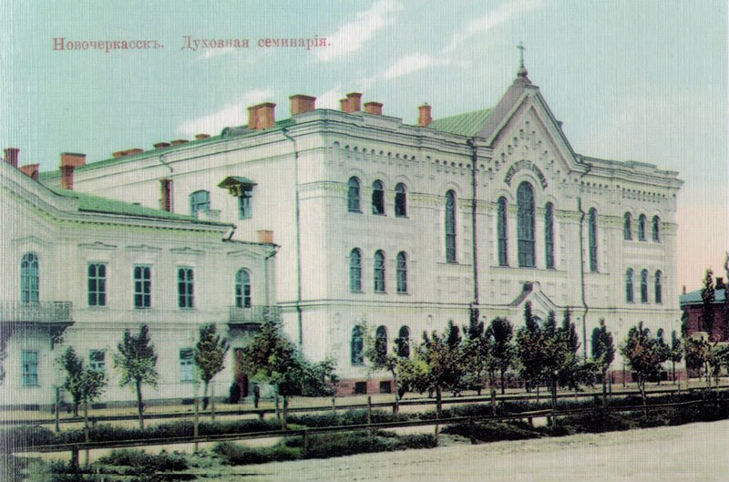 Здание Донской духовной семинарии с домовой церковью Иоанна Богослова